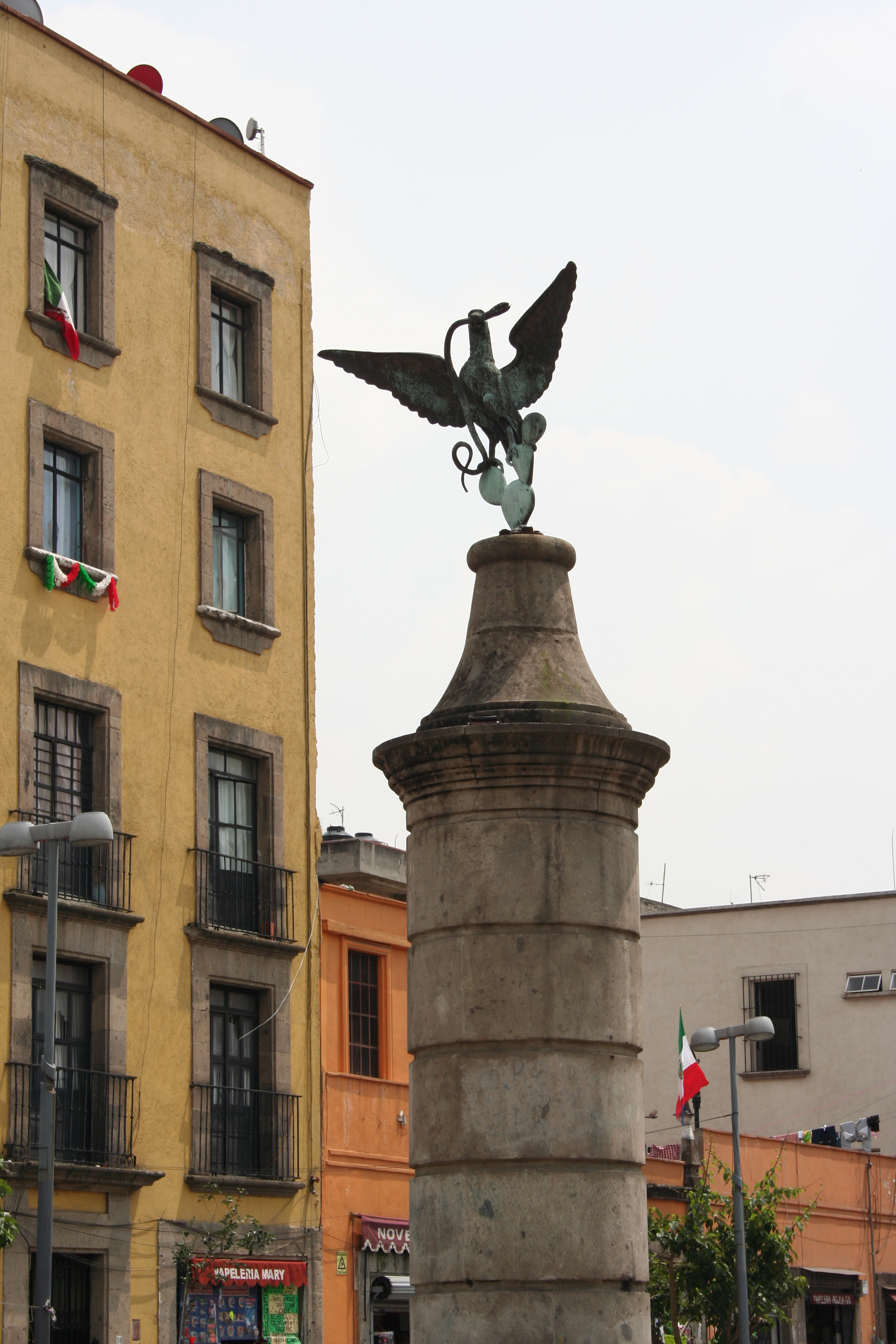 Plaza de la Aguilita (columna)